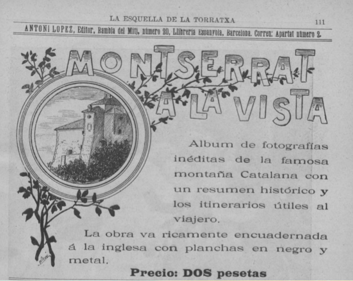 Detalle de una página de la revista La Esquella de la Torratxa